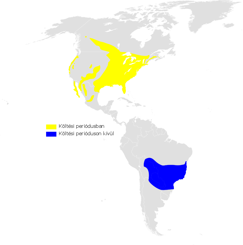 Progne subis distribution map, based on